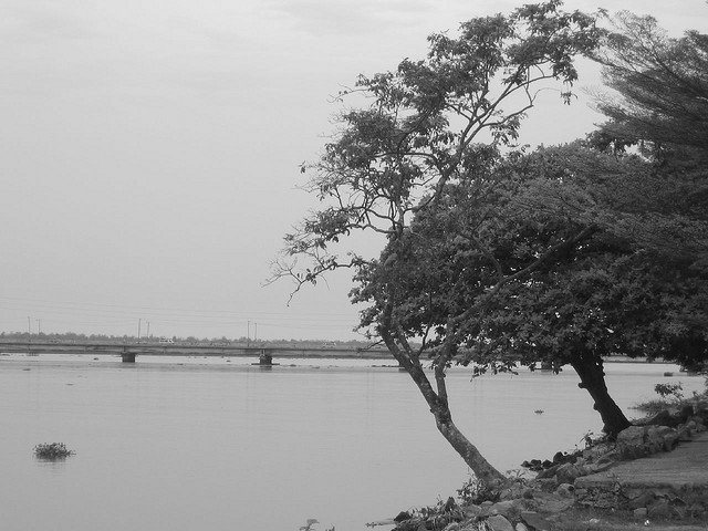 Река Вури около города Дуала (Камерун).